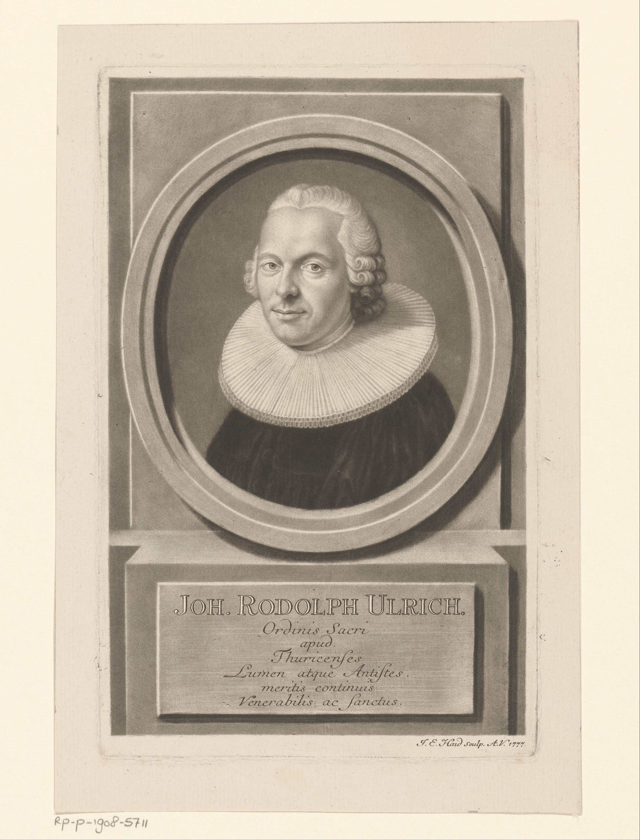 IdentificatieTitel(s): Portret van Johann Rudolf UlrichObjecttype: prent Objectnummer: RP-P-1908-5711Catalogusreferentie: HAB A 22476Opschriften / Merken: verzamelaarsmerk, verso, gestempeld: Lugt 2228VervaardigingVervaardiger: prentmaker: Johann Elias Haid (vermeld op object)Plaats vervaardiging: AugsburgDatering: 1749 - 1809Materiaal: papier Techniek: mezzotintAfmetingen: plaatrand: h 222 mm × b 140 mmOnderwerpWat: historical personstheologianWie: Johann Rudolf UlrichVerwerving en rechtenVerwerving: aankoop 1905Copyright: Publiek domein